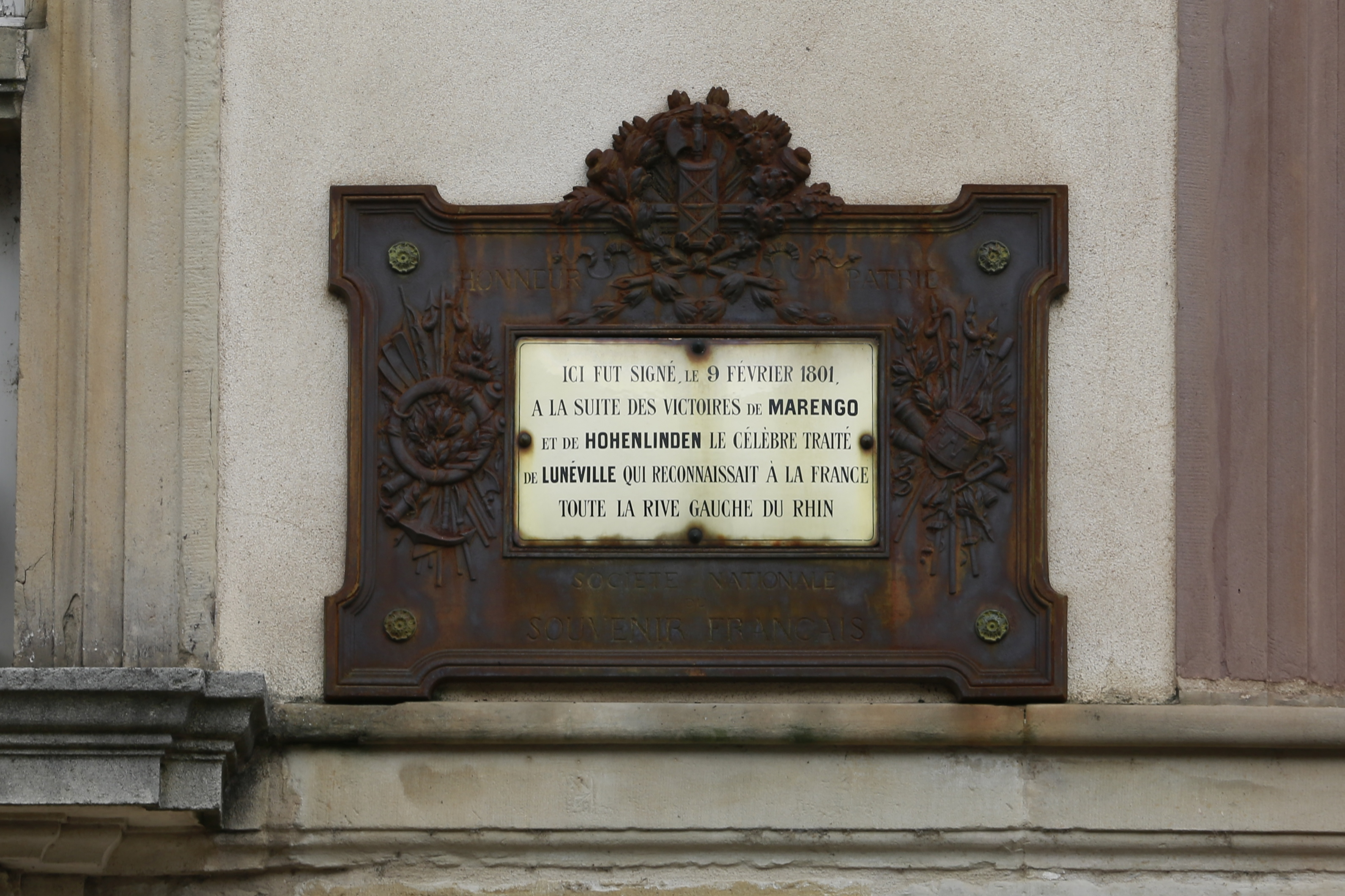 Immeuble, 61 rue de Lorraine à Lunéville : plaque commémorative de la signature du traité de Lunéville.